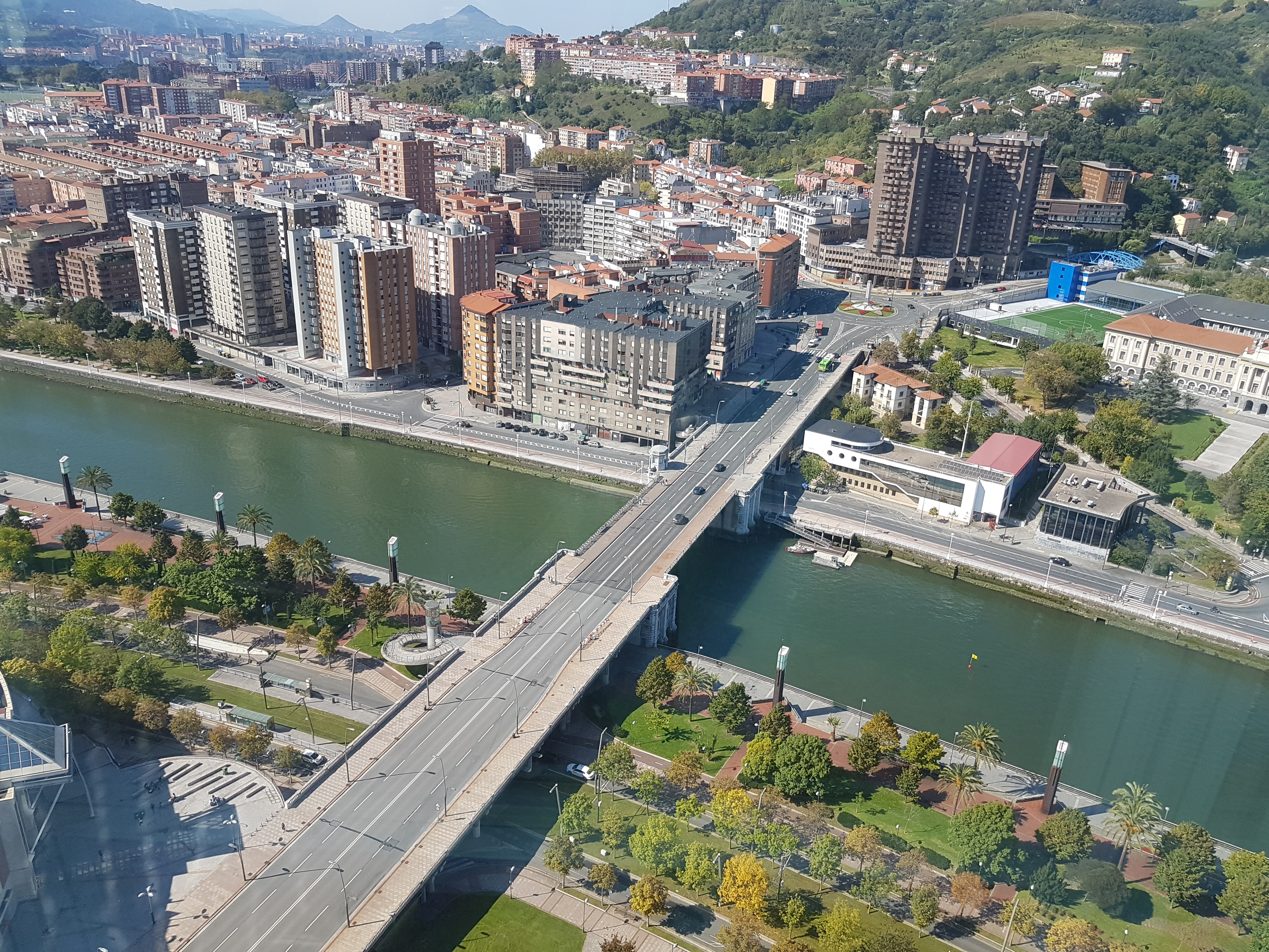 Abandoibarra.